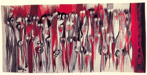 Tapijt Pena Negra, 1982